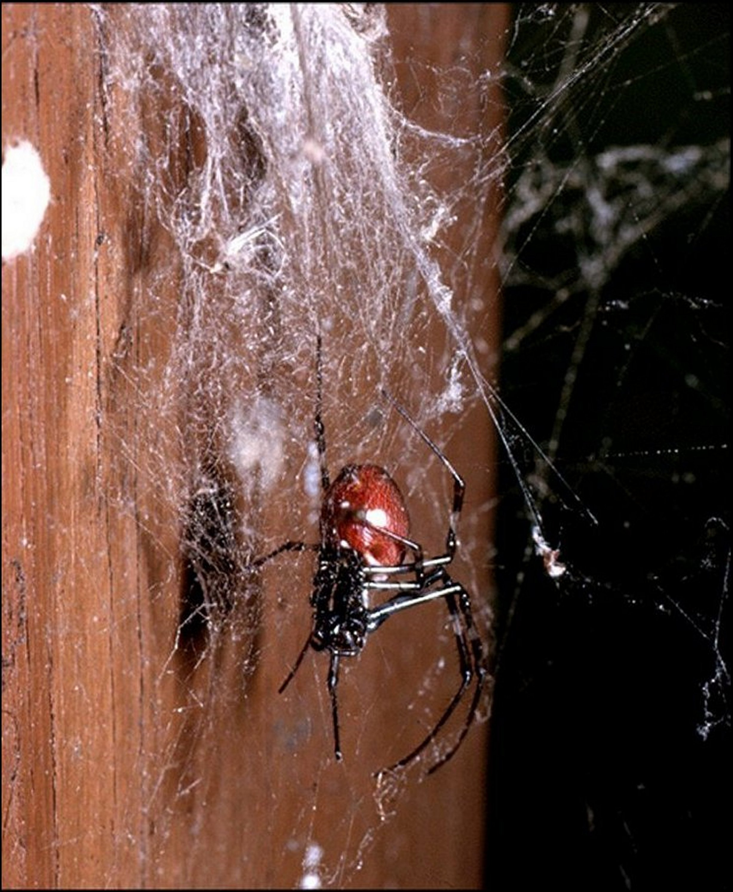 Nephilengis borbonica, femelle dans sa toile,sous l'orifice de la retraite. Vue ventrale. Hangard, Salazie, île de la Réunion.